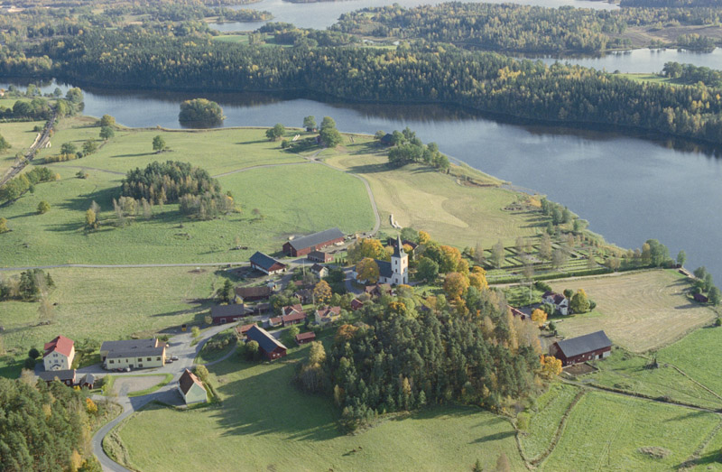 Mellösa kyrka och kyrkby. Bilden är tagen mot (väderstreck): SO Motiv: Mellösa Nyckelord: Flygbilder, Riksintressen Kategori: KyrkomiljöMellösa kyrka och kyrkby. Bilden är tagen mot (väderstreck): SO.